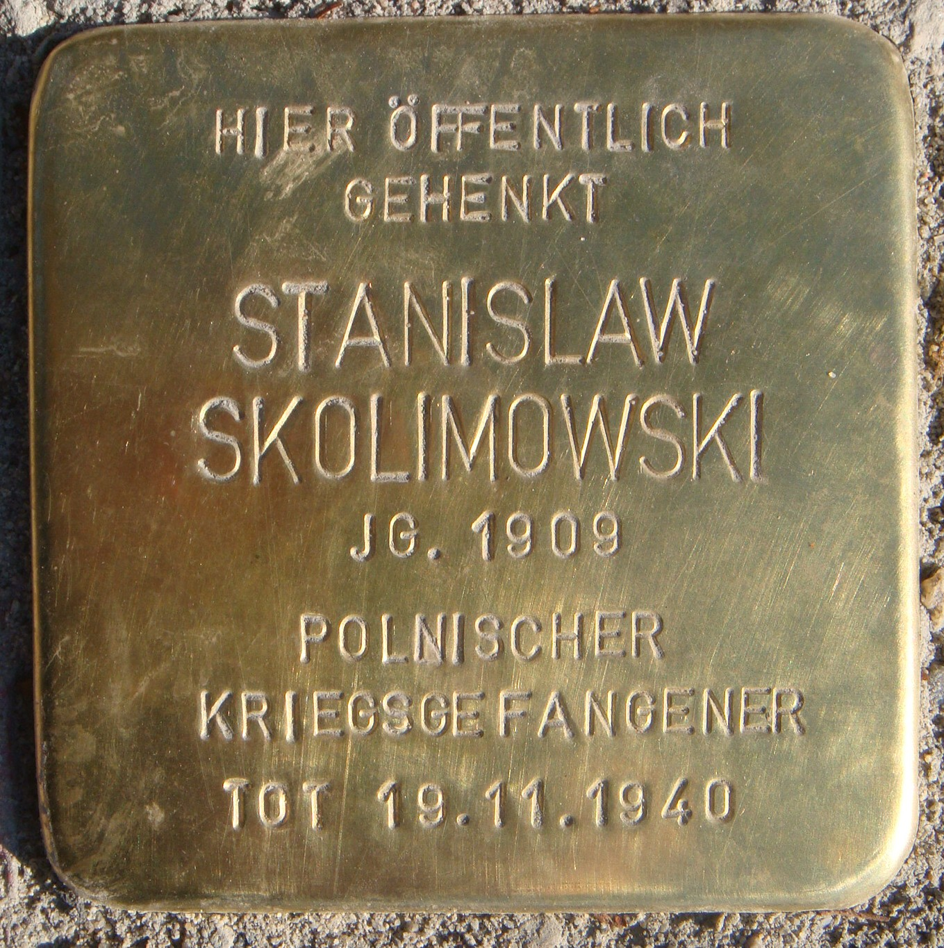 Stolperstein für Stanislaw Skolimowski